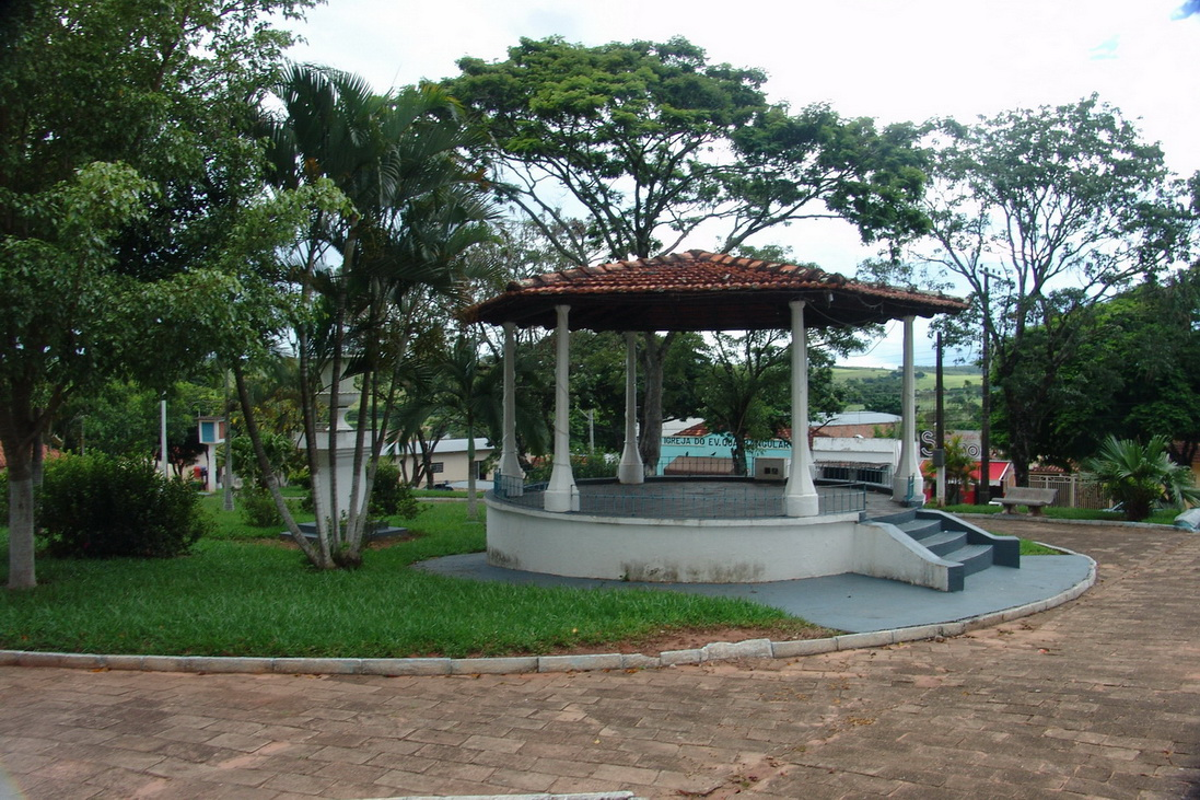 Vistas do município de Lucianópolis, estado de São Paulo, Brasil.